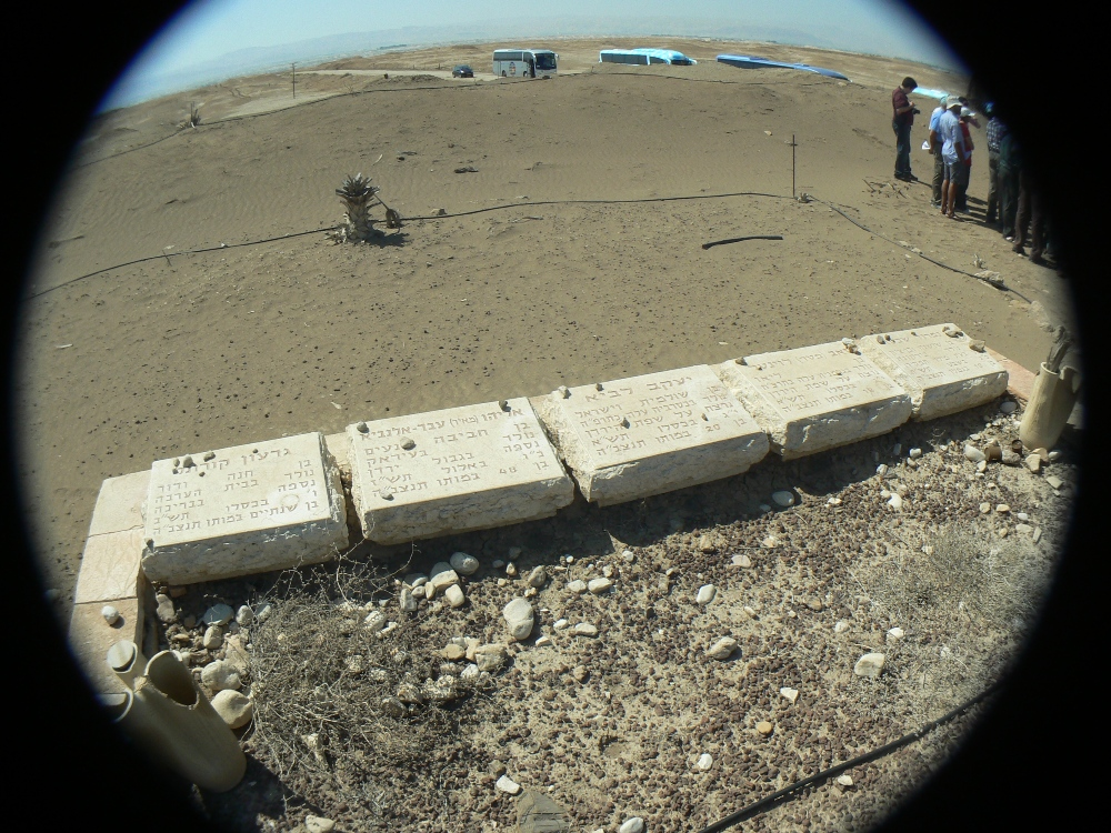 בית הערבה - קבר האחים